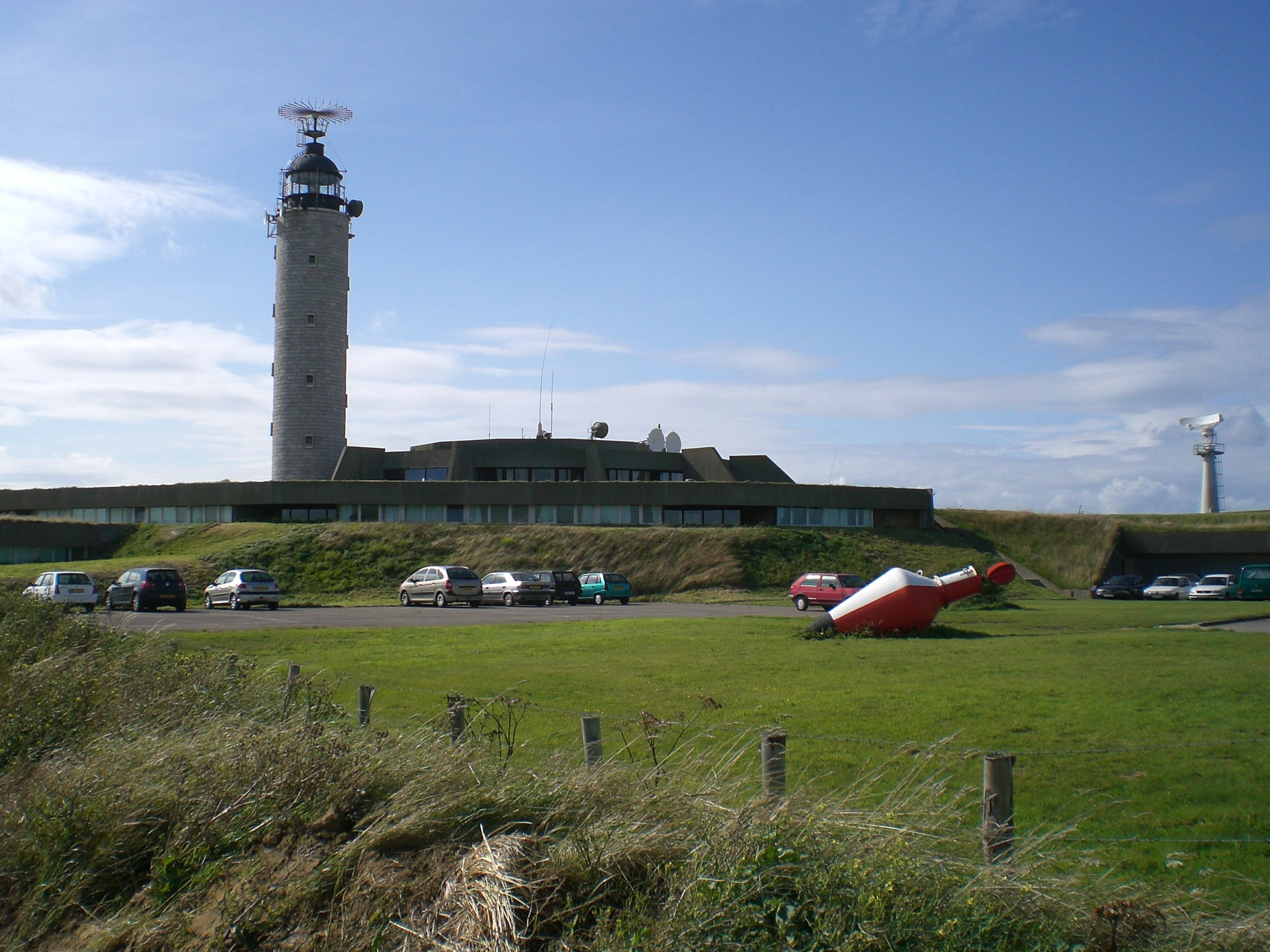 Le Cap Gris-Nez est en France le lieu le plus proche de l'Angleterre. On distingue sur la photo le phare du Cap Gris-Nez qui porte à 45 km et à sa base le Centre Régional Opérationnel de Surveillance et de Sauvetage (CROSS) qui a en charge de gérer le trafic maritime de la Manche qui est plus important au monde : 500 navires par jour.